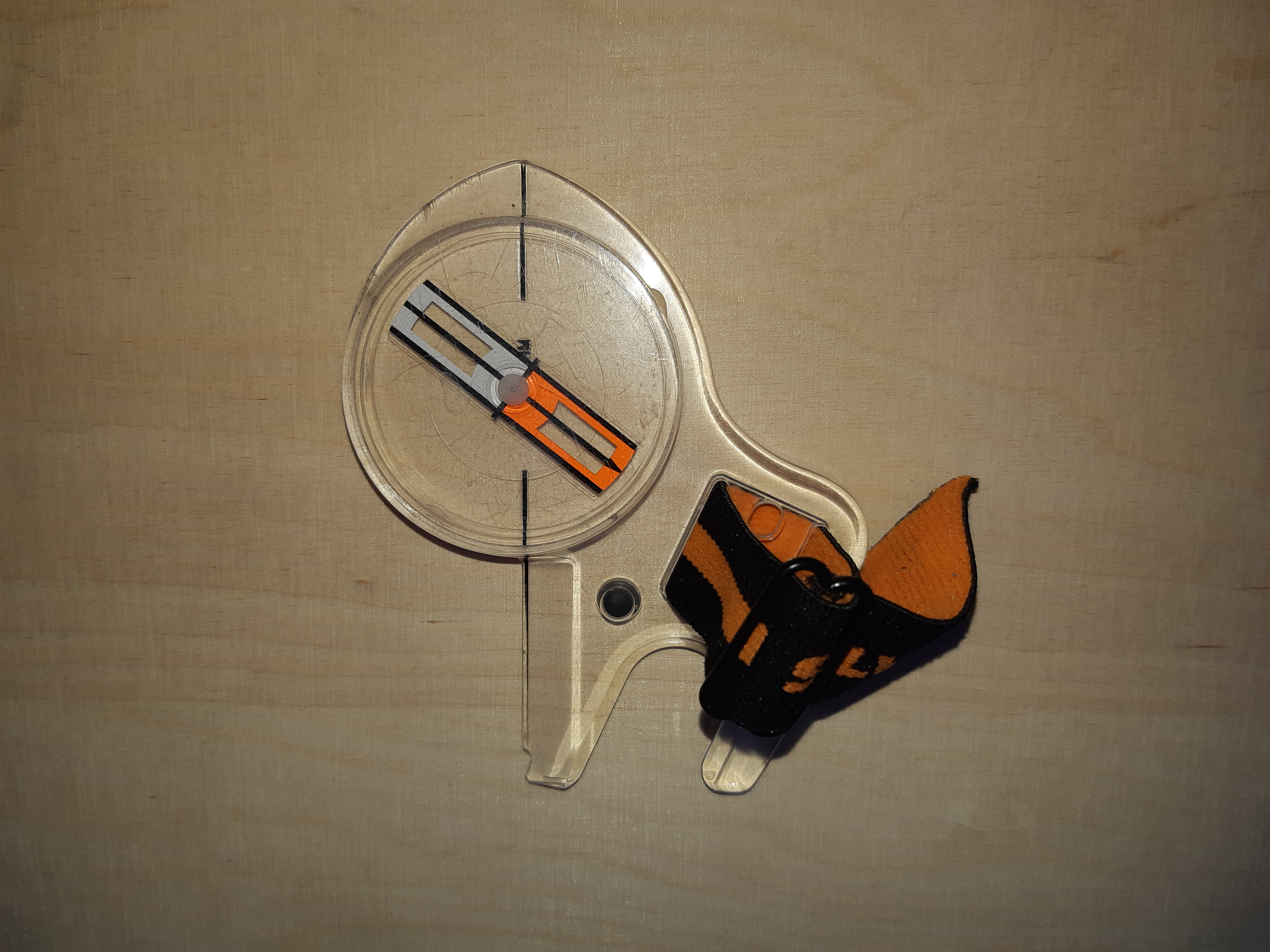 Pöidlakompass